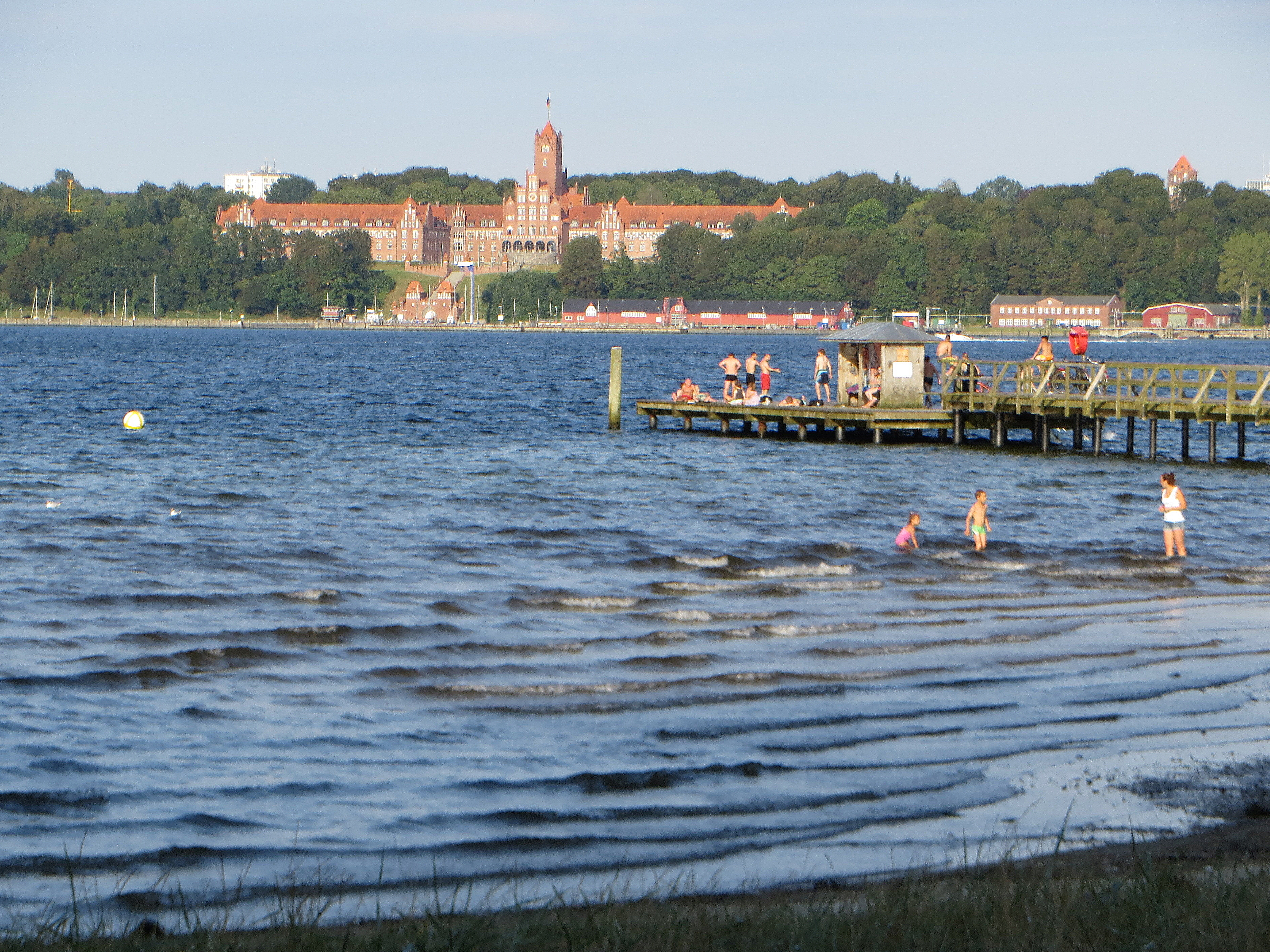 Ostseebad-Brücke und MSM (Flensburg Sommer 2014), Bild 03